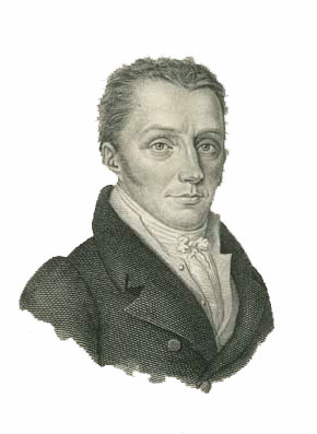 Portet van Hajo Albert Spandaw (1777-1855)